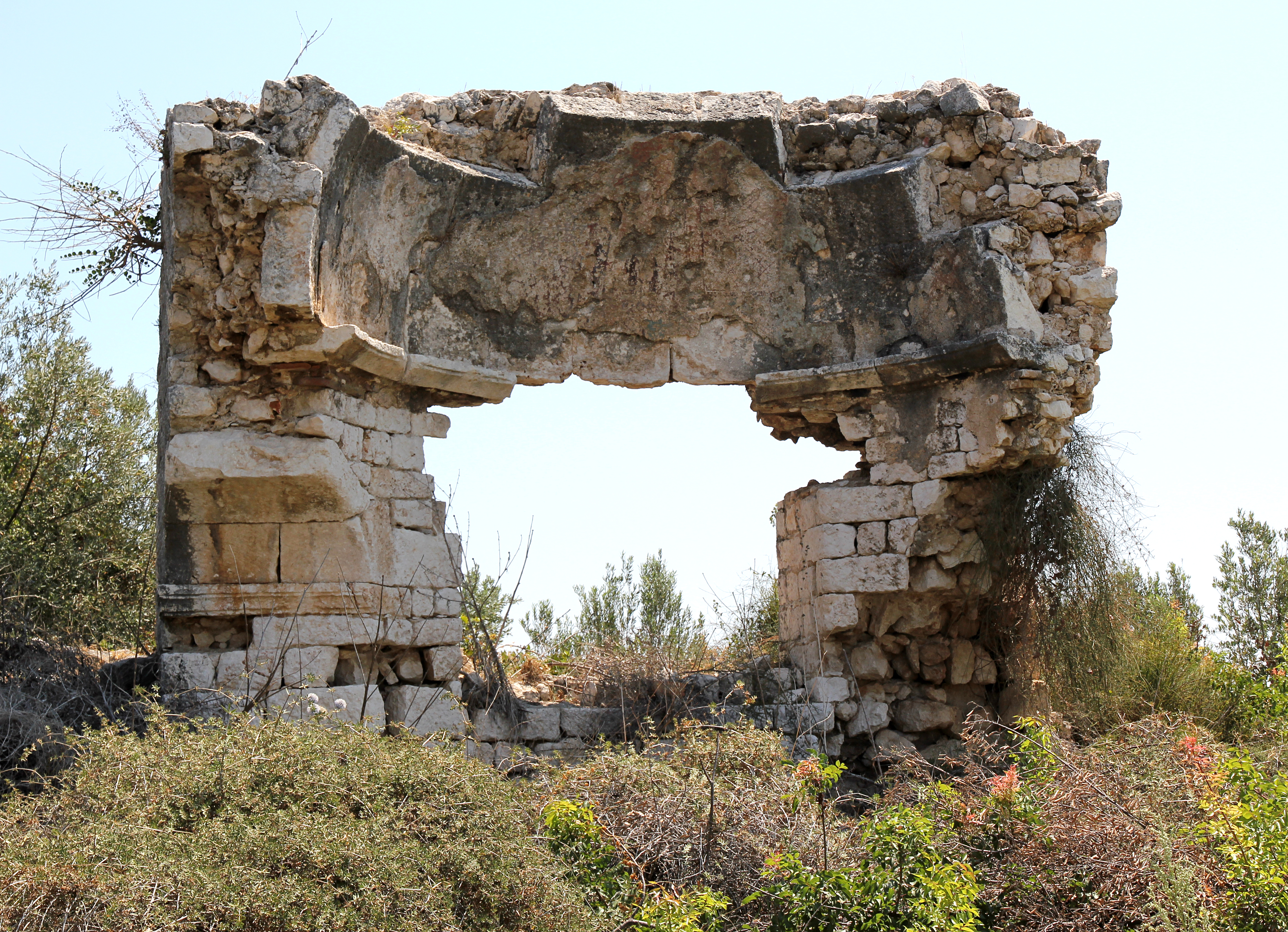 Korykos, archäologischer Fundort in der Südtürkei, Kirche über der Zisterne, Apsis von Westen